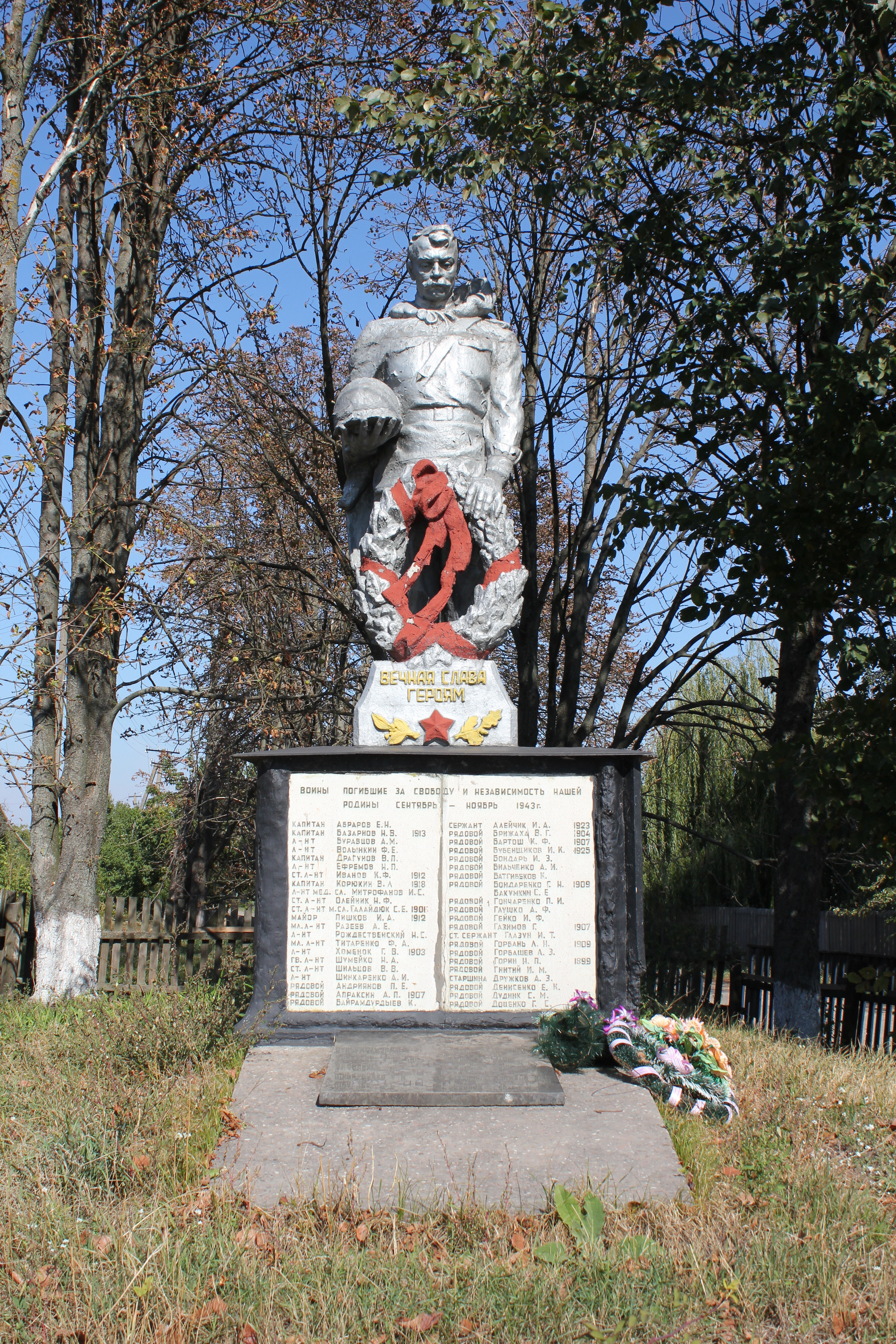 Братська могила воїнів Радянської Армії, які загинули в роки Великої Вітчизняної війни, село Хоцьки, центр села